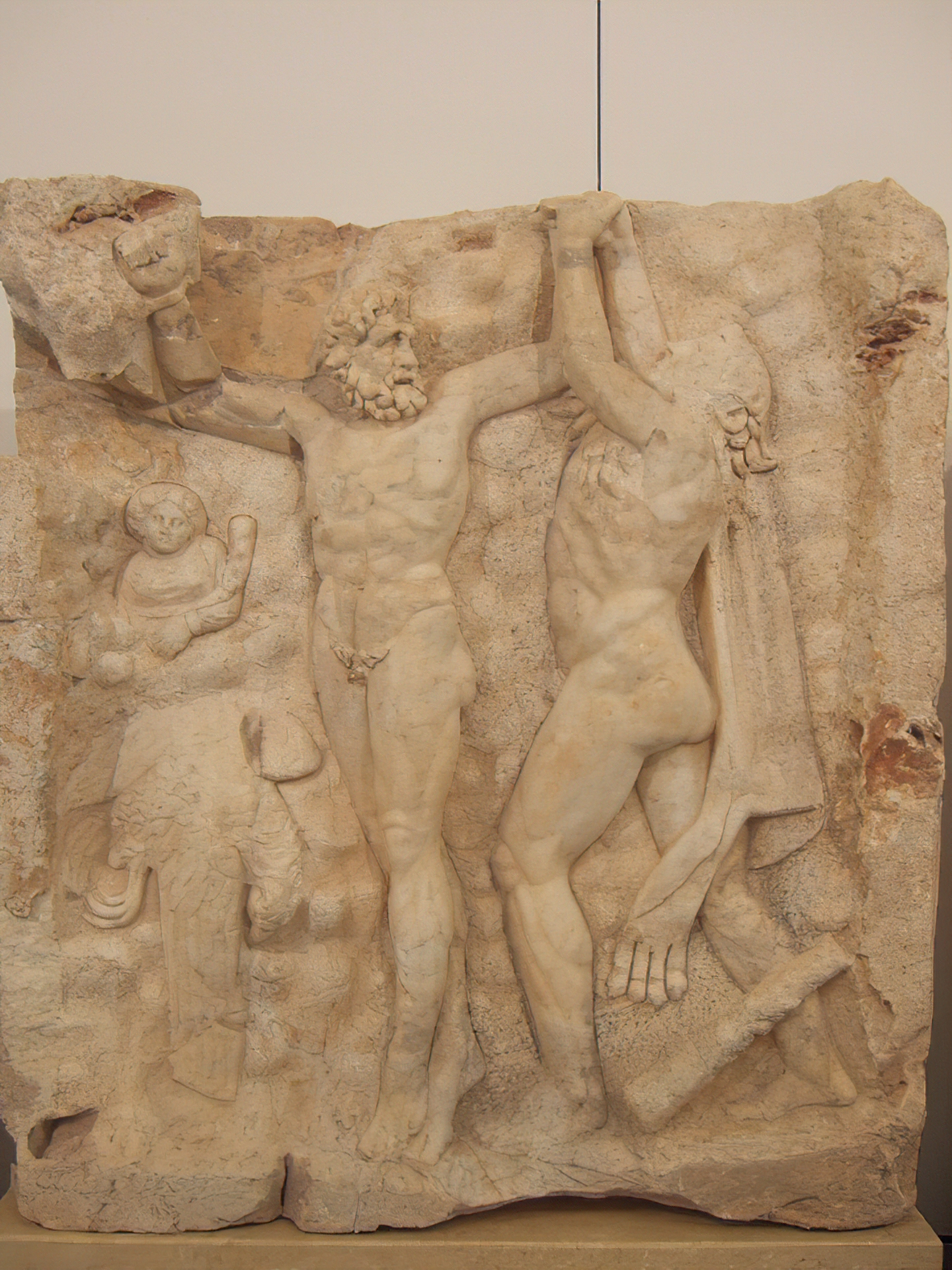 Aphrodisias (Museum): Herakles befreit Prometheus - Relief des Aphrodite-Tempels